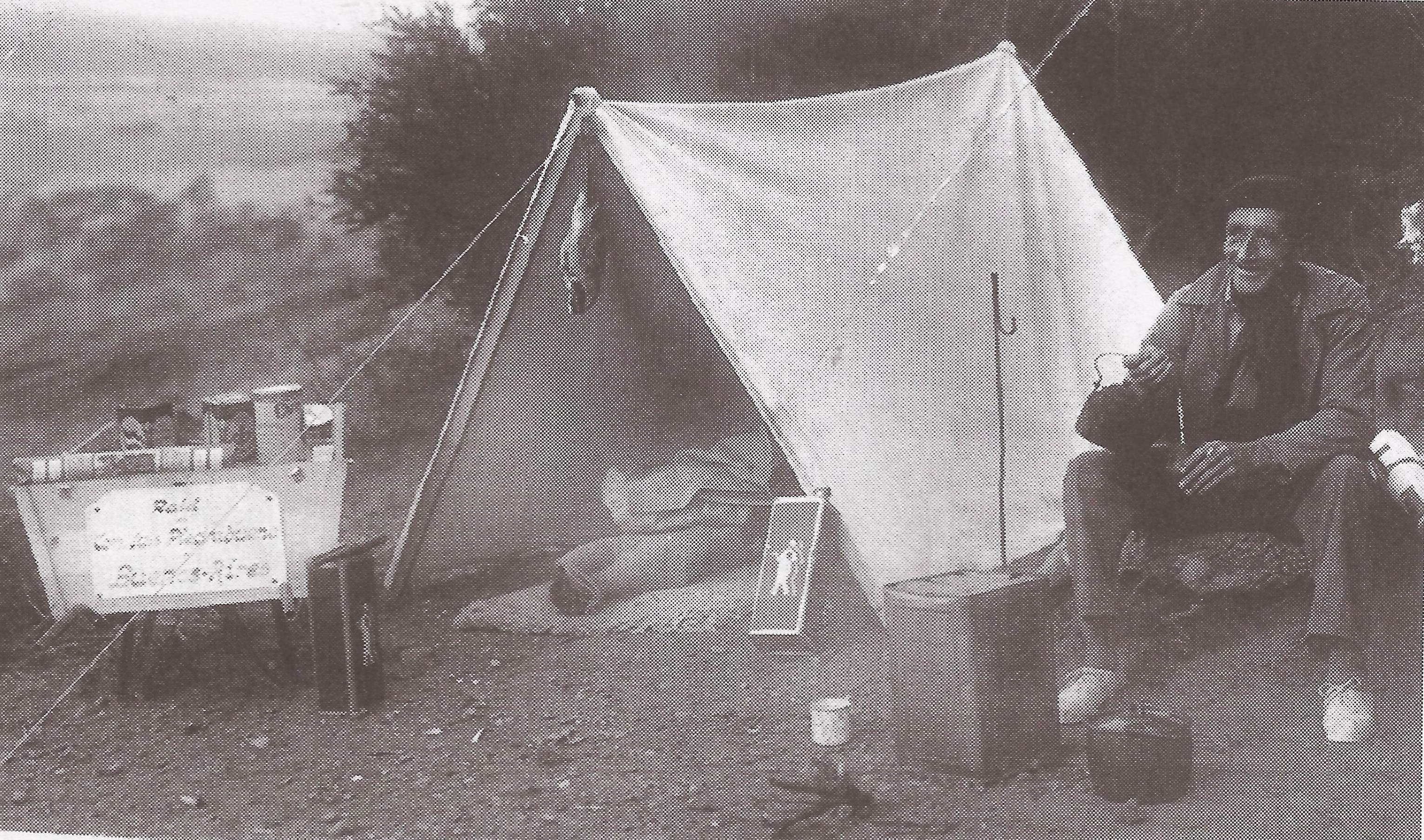 El Vasco de la Carretilla en Kilómetro 3, Chubut, Argentina, en septiembre de 1935